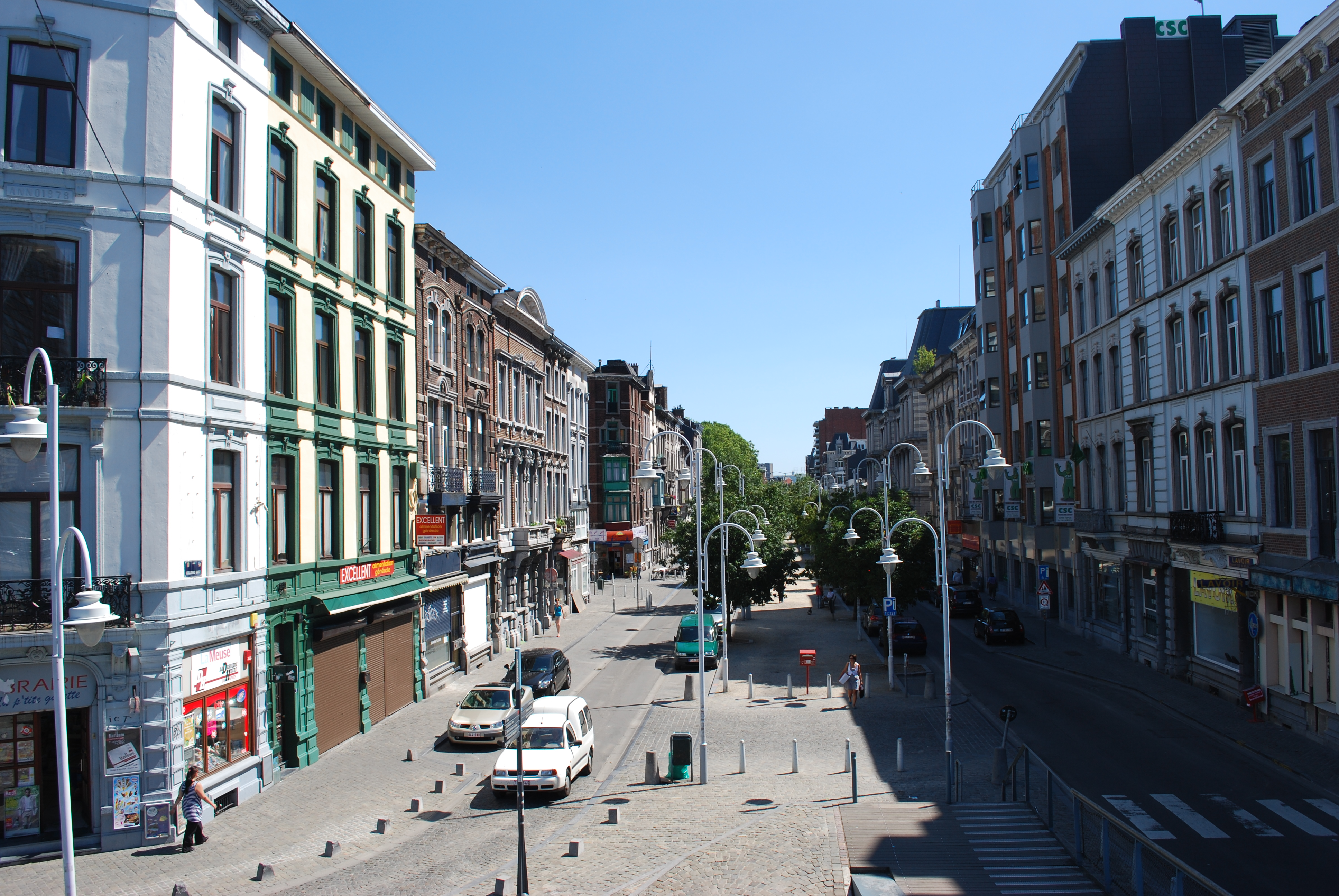 Le boulevard Saucy à Liège.